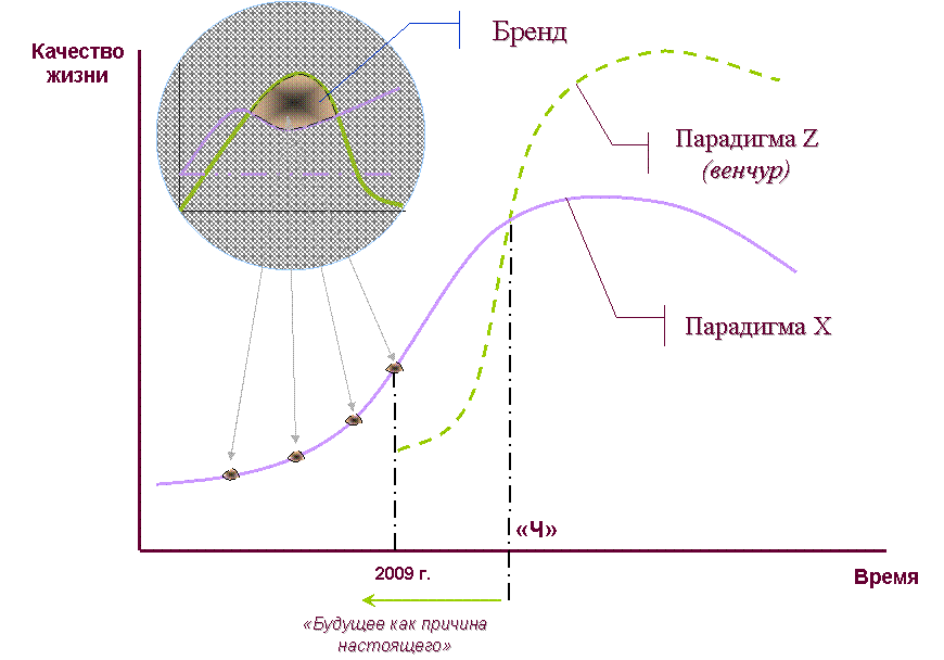 Доминирование традиции (кривая "парадигма Х") завершается в точке пересечения с кривой инновации ("парадигма Z"). Этот момент можно рассматривать как переломный, он лежит в Будущем, и тогда служит причиной Настоящего.